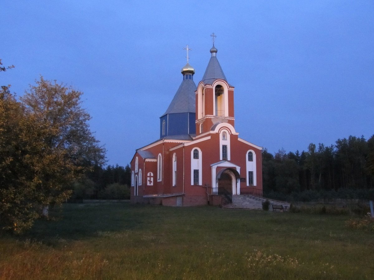 Акцябрскі раён